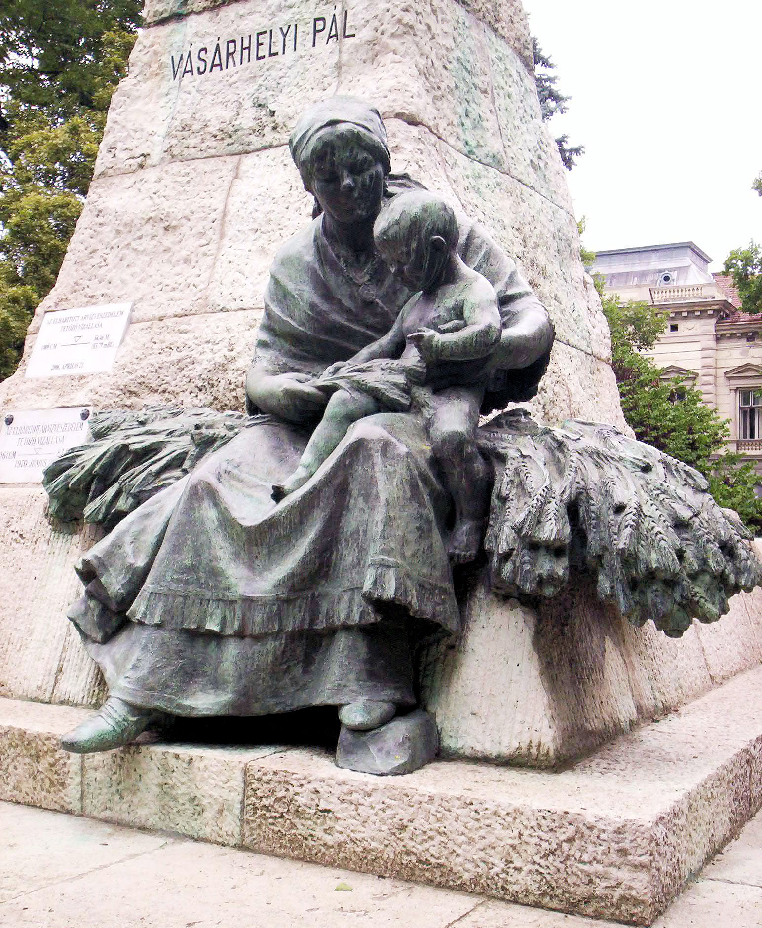 A szegedi Vásárhelyi-szobor egyik mellékalakja. Pásztor János (1881–1945) alkotása (1905)